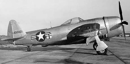 Republic P-47D-30-RE side view